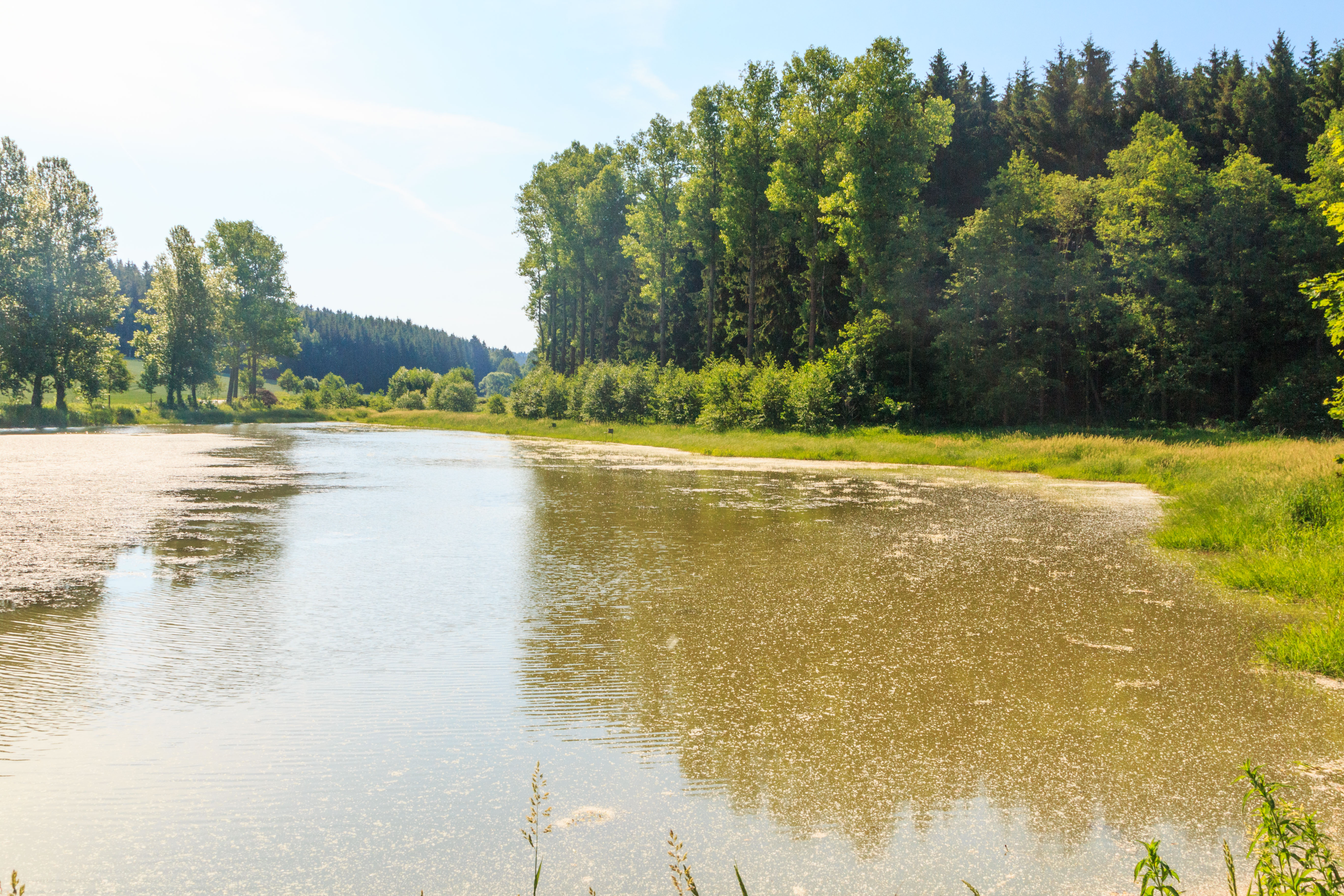 Troubný rybník u Poličky Project: Vodstvo.